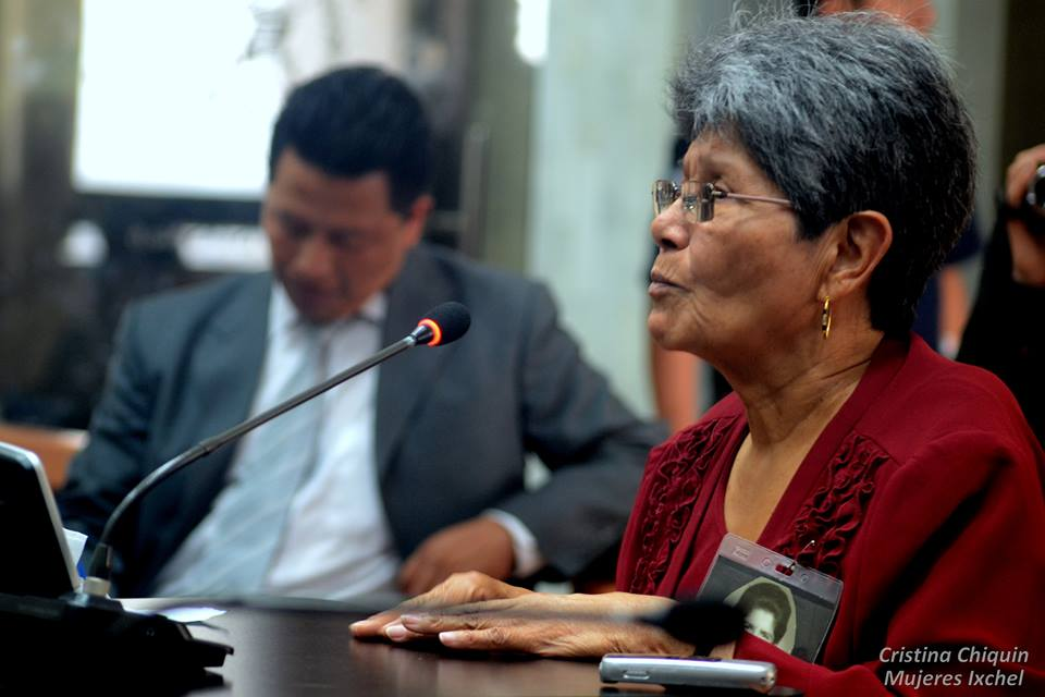 Aura Elena Farfán declarando ante tribunales sobre las desapariciones y atrocidades que cometió el ejercito de Guatemala durante el Conflicto Armado Interno, en el caso del Diario Militar, donde aparece su hermano Rubén Amilcar Farfán .